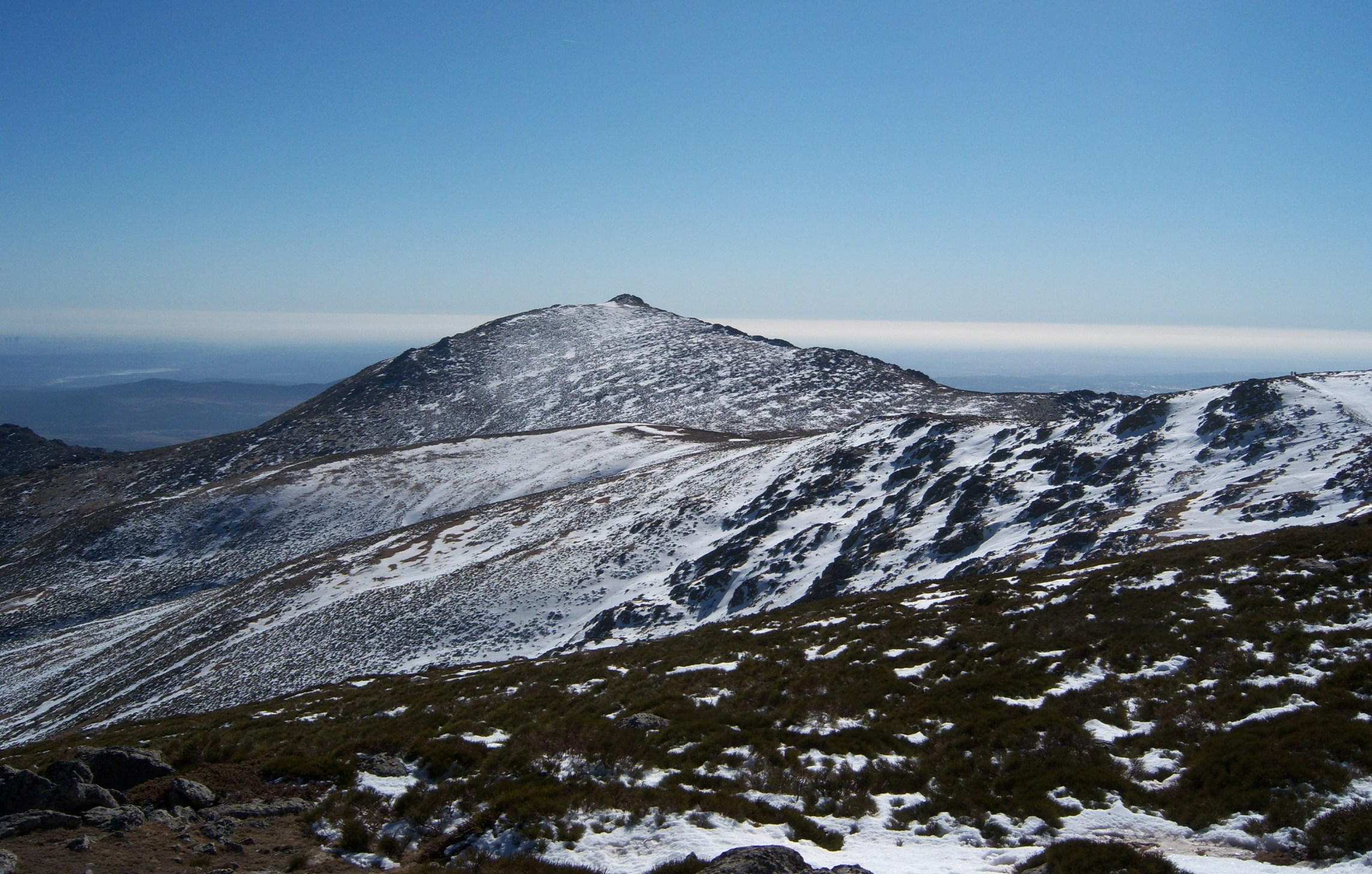 Cara norte del pico de La Maliciosa vista desde el Cerro de Valdemartín (Sierra de Guadarrama, España).